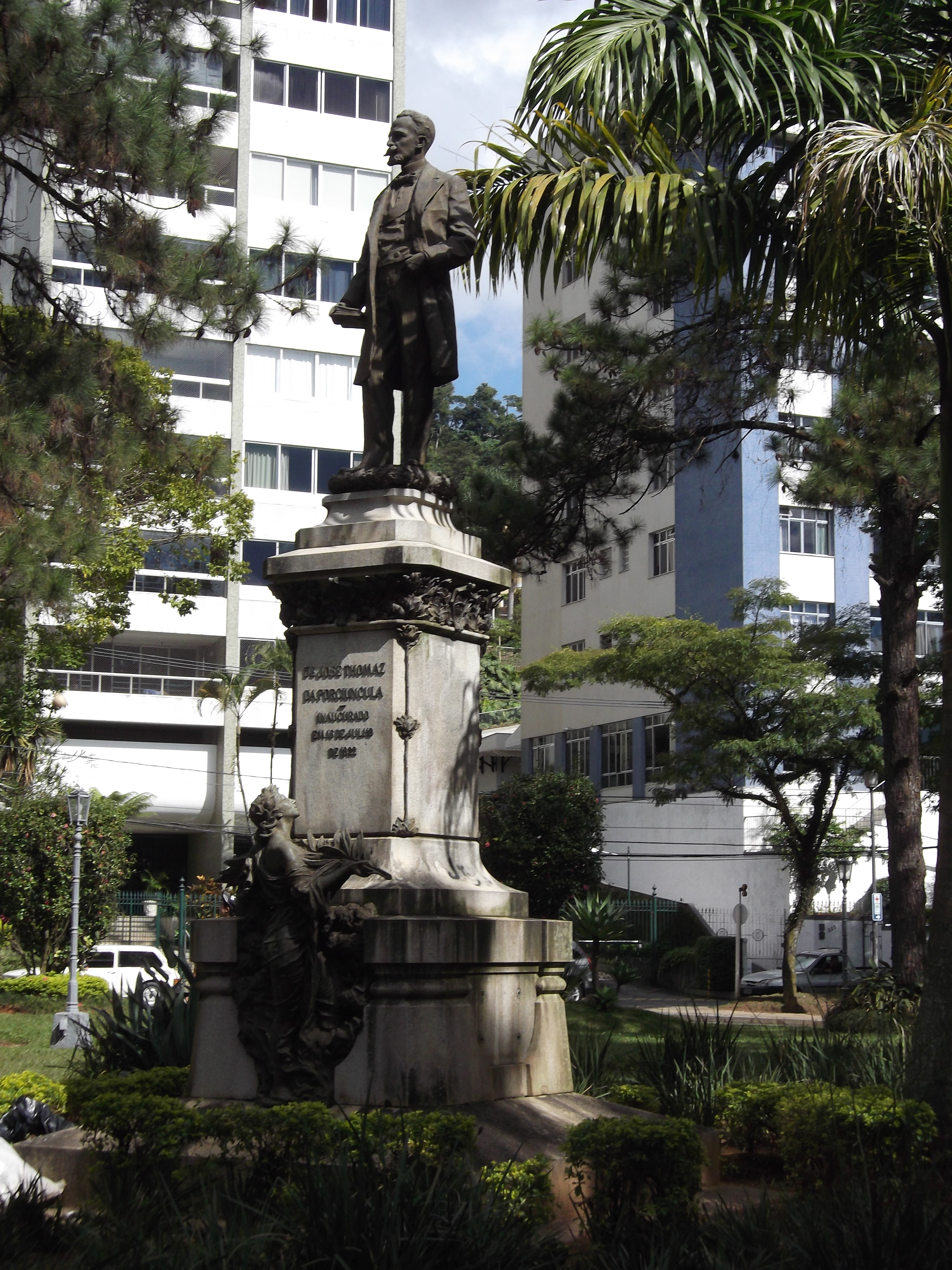 Estátua de José Thomaz da Porciuncula, Petrópolis, estado do Rio de Janeiro, Brasil